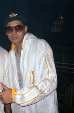 Conteúdo Próprio